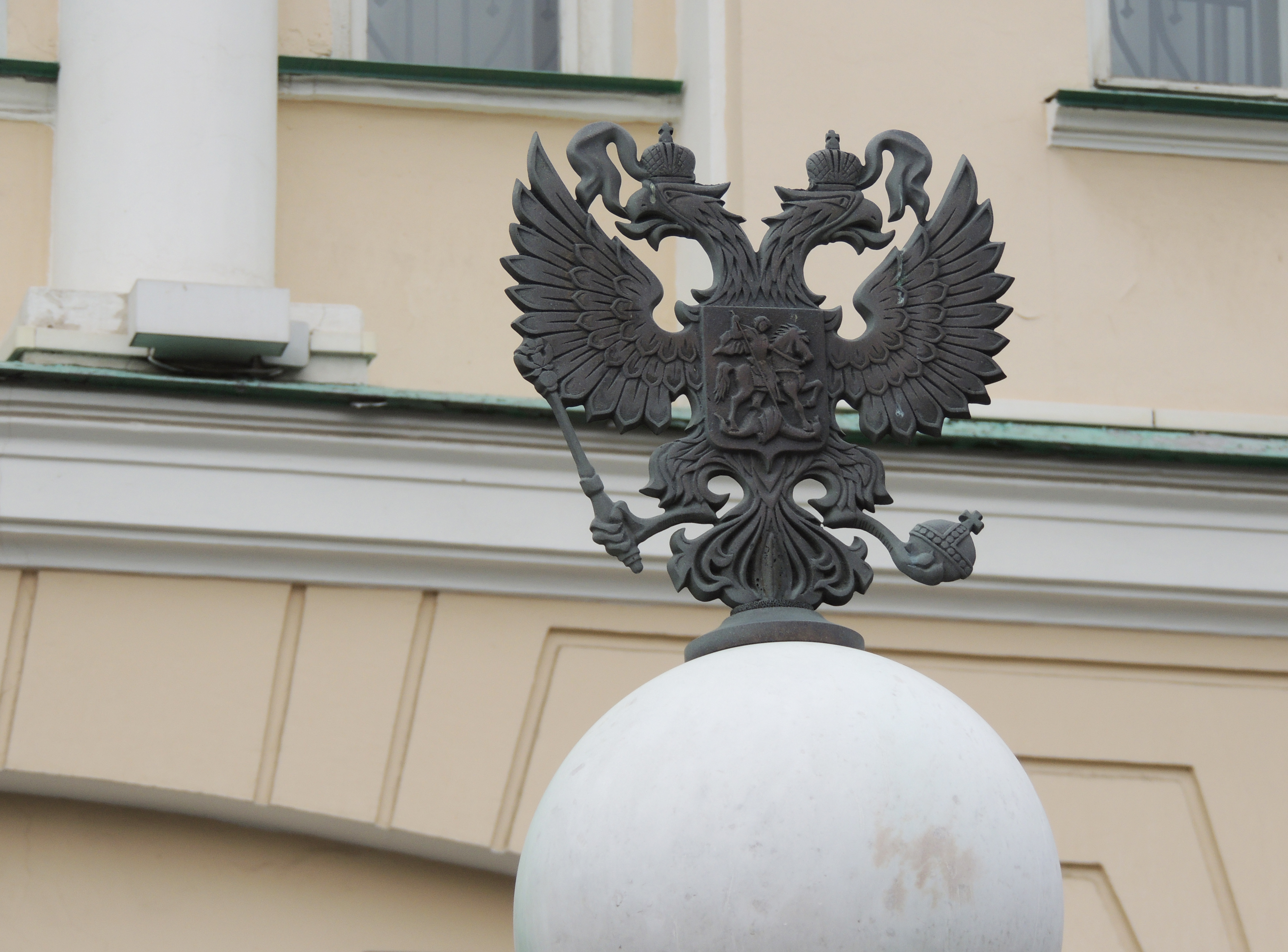 Горная аптека (здание аптеки Горного ведомства) (Свердловская область, Екатеринбург, Ленина проспект, 37)